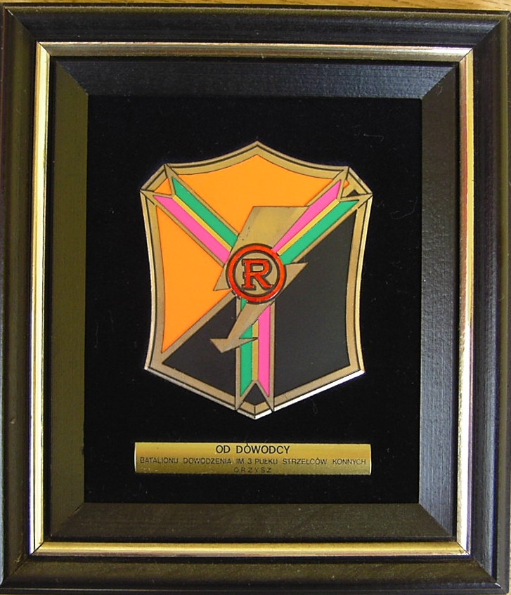 Znak batalionu dowodzenia z 4 BKPanc - Orzysz